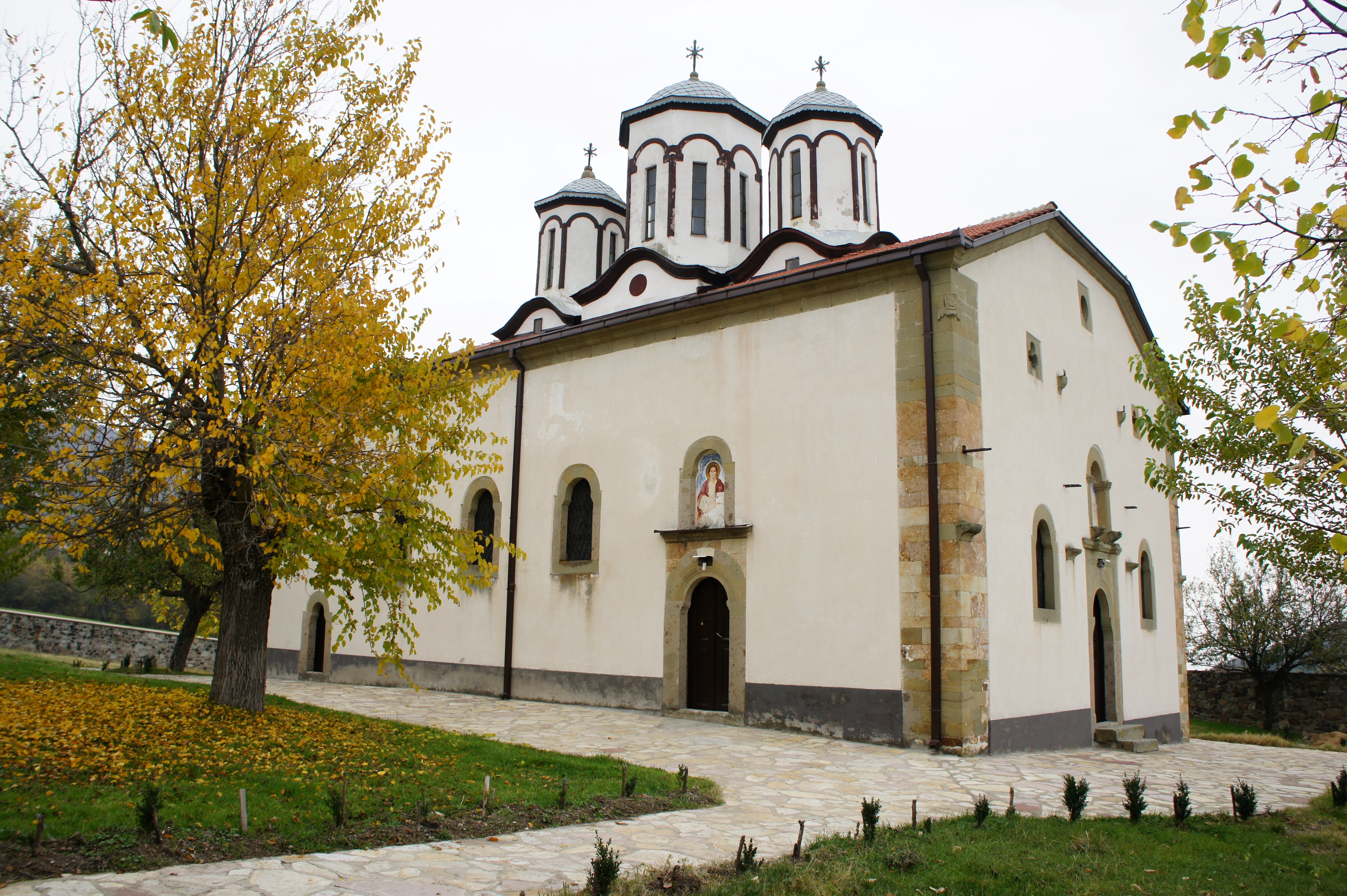 Манастирскиот комплекс Св. Пантелејмон во непосредна близина на градот Кочани е граден во 1885 година на темелите на стара црква градена од XV век. Посебна вредност на манастирот се фрескоживописот и дел од иконите кои се работени од познатиот сликар Димитар Андонов - Папрадишки.